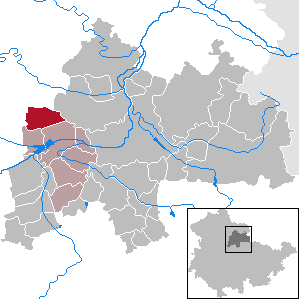 Gangloffsömmern in Thuringia - District Sömmerda